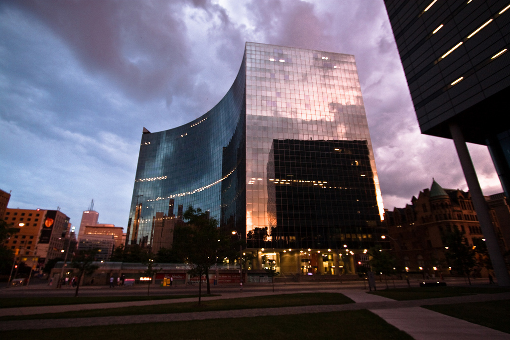 Ontario Hydro building